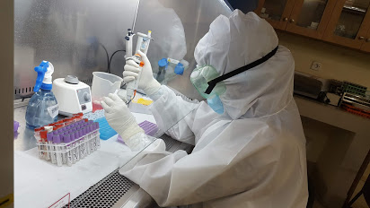 একজন মলিকুলার বায়োলজিস্ট সন্দেহভাজন রোগীর থেকে সংগ্রহকৃত স্যাম্পল থেকে ভাইরাসের আরএনএ সংগ্রহ করছেন